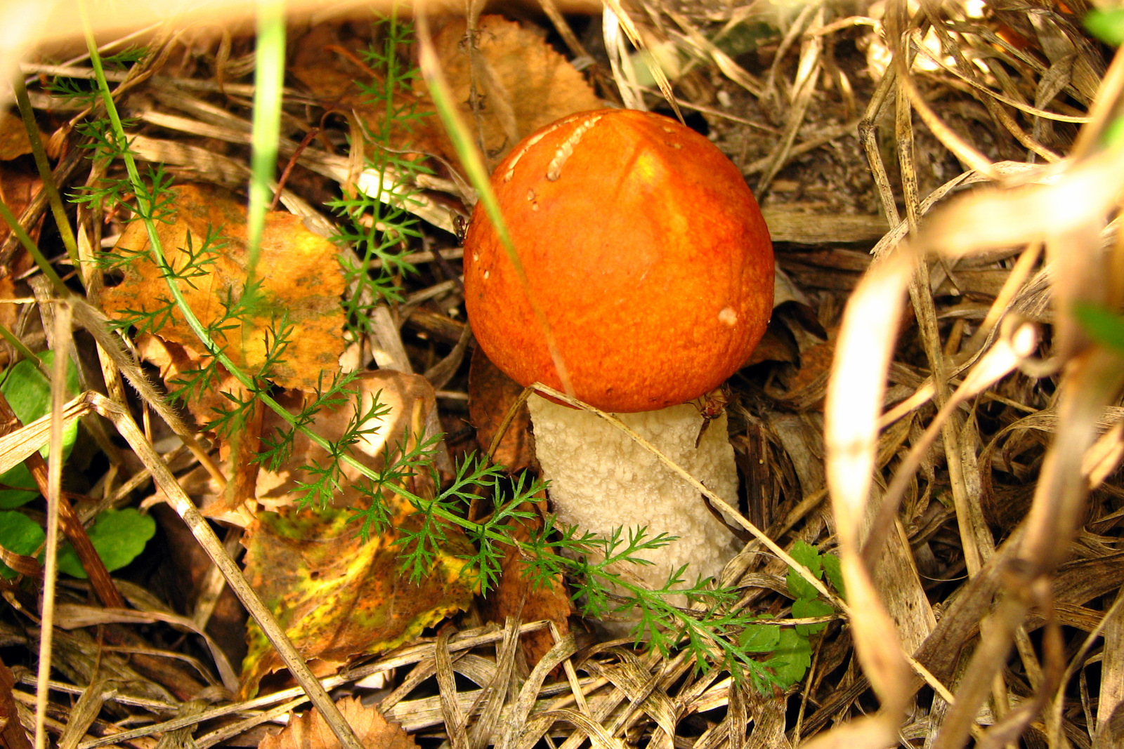 Подосиновик.